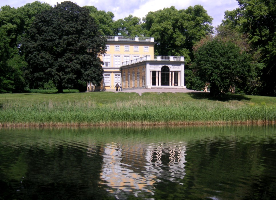 Gustav III. Pavillon im Hagapark